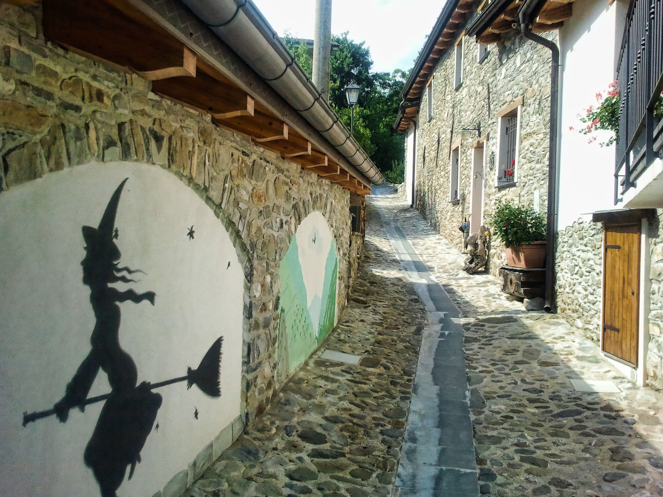 18010 Molini di Triora IM, Italy